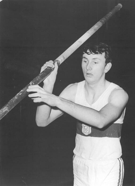 Manfred Frühauf Zentralbild Wendorf sche 09.02.1969 Berlin: Deutsche Meisterschaften der DDR in der Hallenleichtathletik - Junioren. Den Titel eines Deutschen Meisters der DDR sicherte sich am 09.02.1969 in der Berliner Dynamohalle Manfred Frühauf im Stabhochsprung mit der Siegerhöhe von 4,70 m. Der junge Sportler vom SC Chemie Halle startet hier gerade zu seinem entscheidenden Versuch.